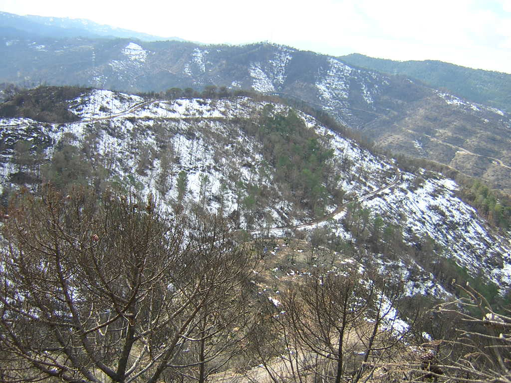 La Baga de l'Om (Monistrol de Calders, Moianès)